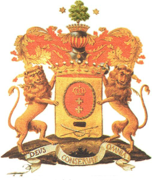 Герб графов Шереметьевых. Российская империя